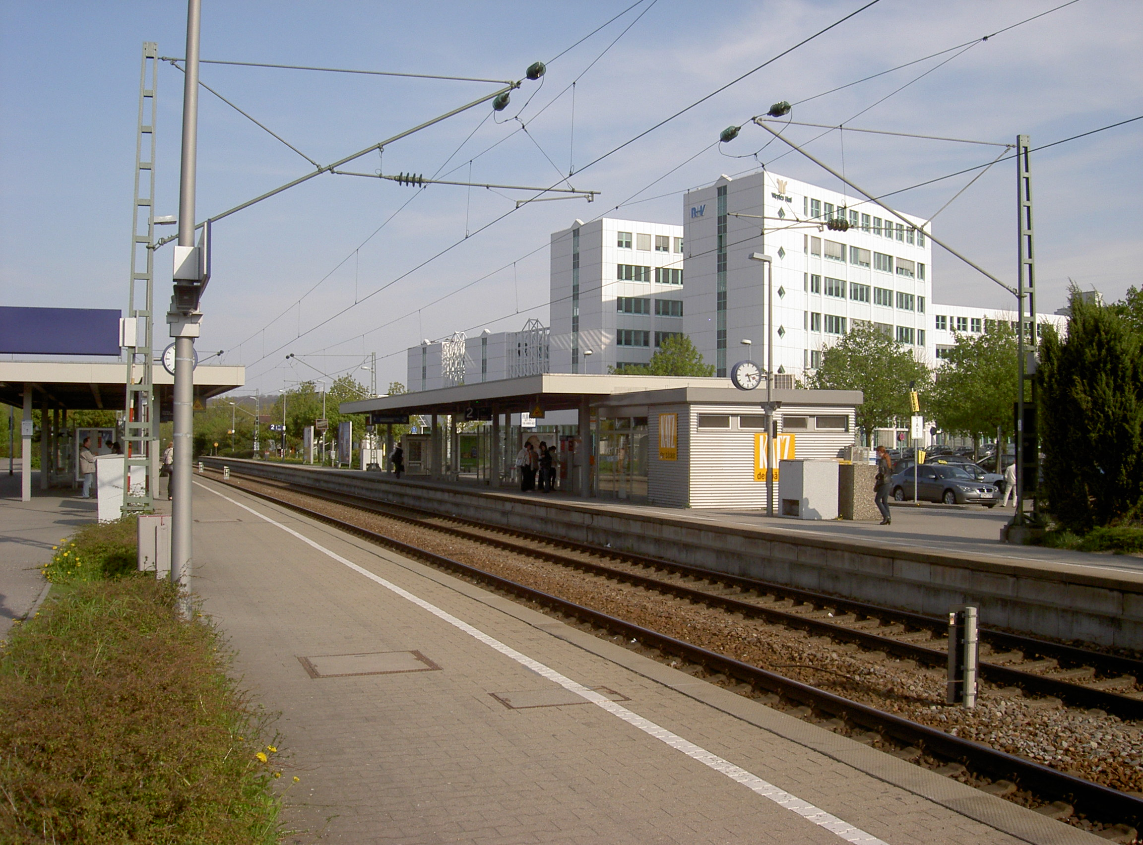 Haltepunkt Stuttgart-Weilimdorf